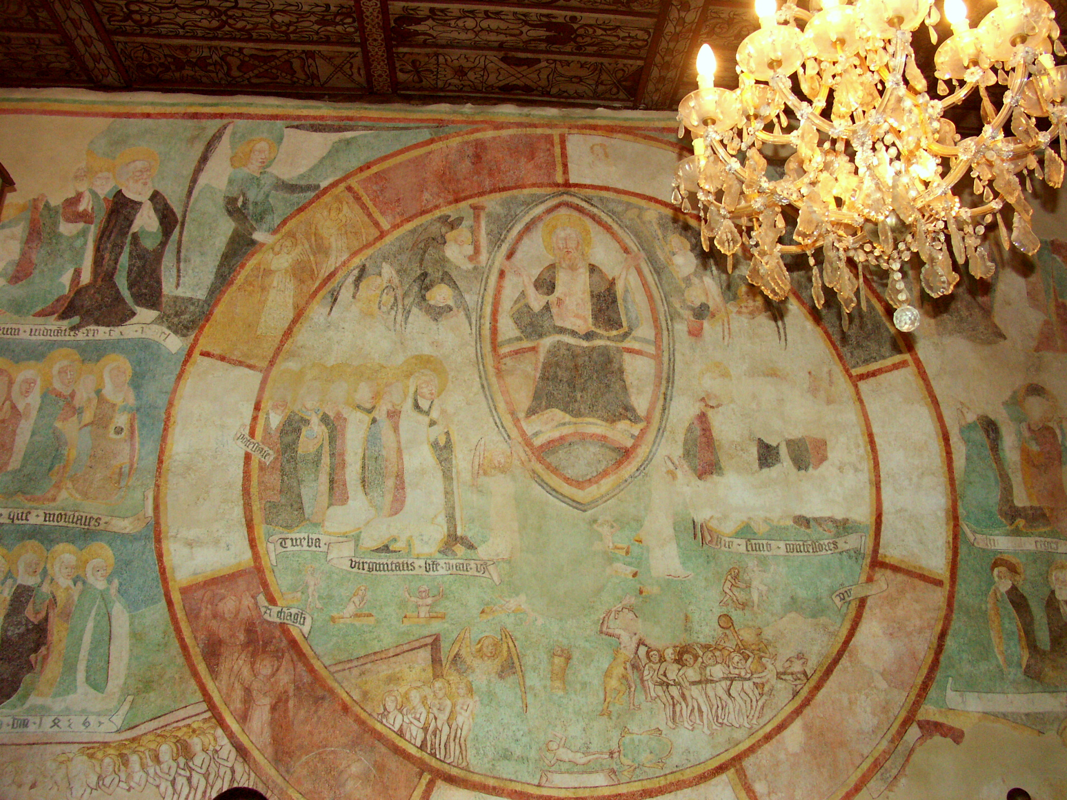 Interiérová výmaľba kostolíka v Kyjaticiach. Maľba s výjavom Posledného súdu na severnej stene